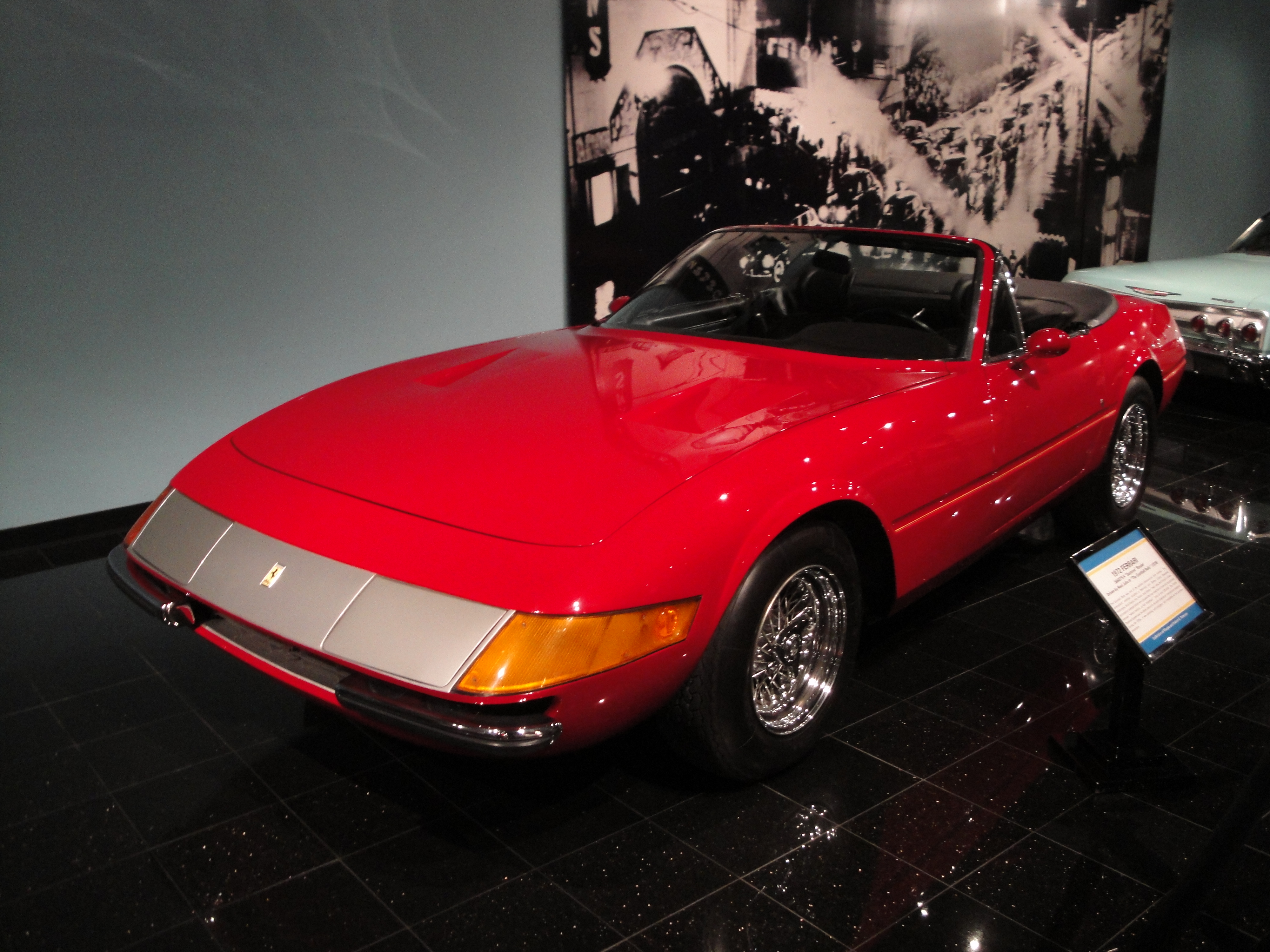 72 Ferrari 365GTS/4 Daytona Spyder